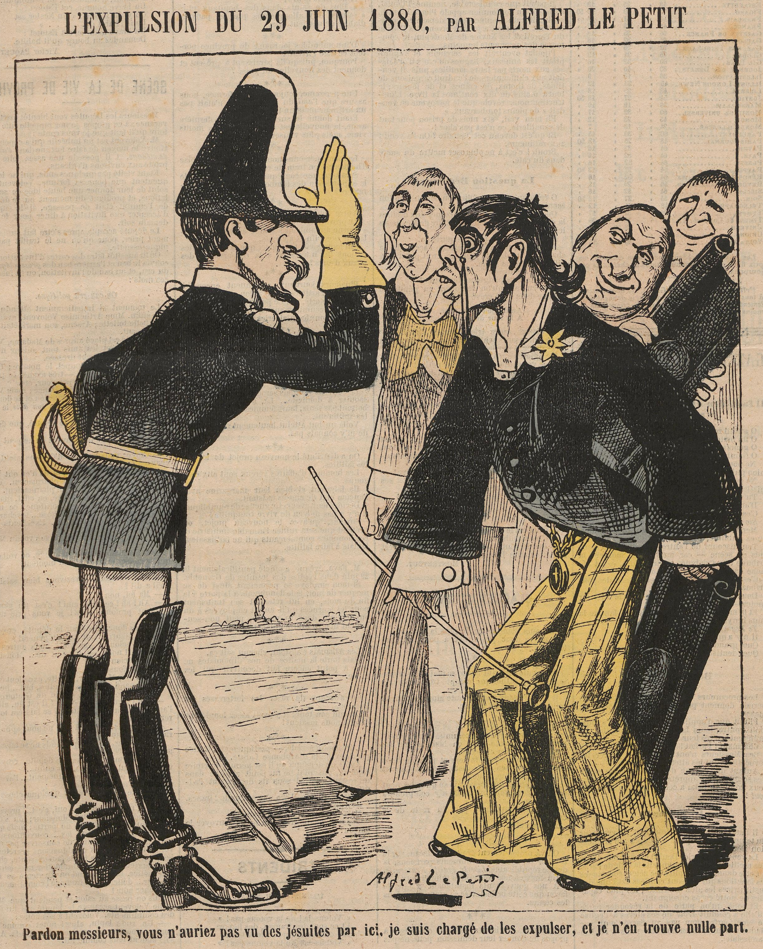 Caricature de l'expulsion des Jésuites du 29 juin 1880.